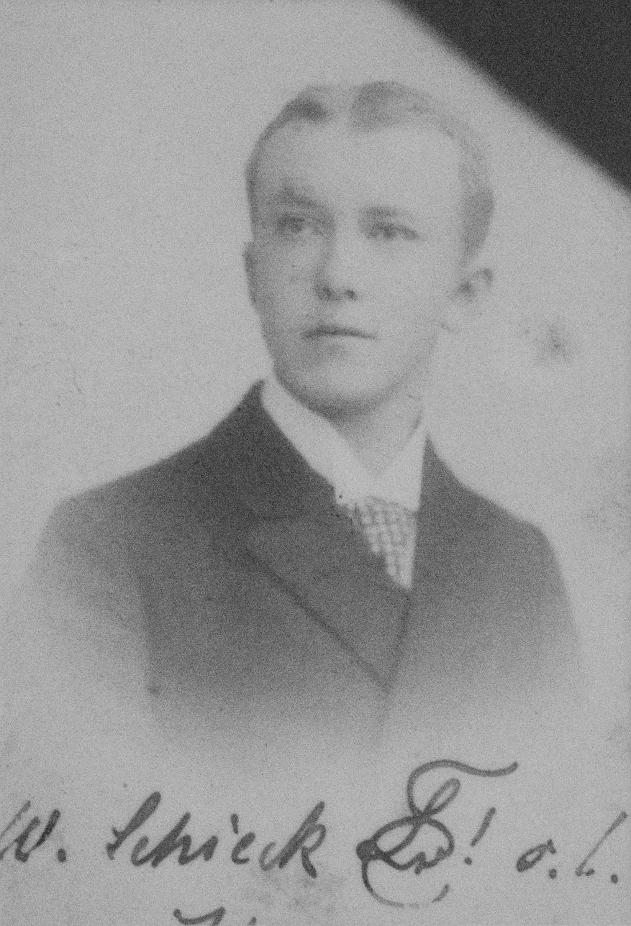 Fotografie von Walther Schieck als Mitglied der Studentenverbindung Leonensia. Unten befindet sich der Zirkel der Verbindung Leonensia. Standort der Fotografie: Ahnengalerie im Conventssaal der Verbindung Leonensia